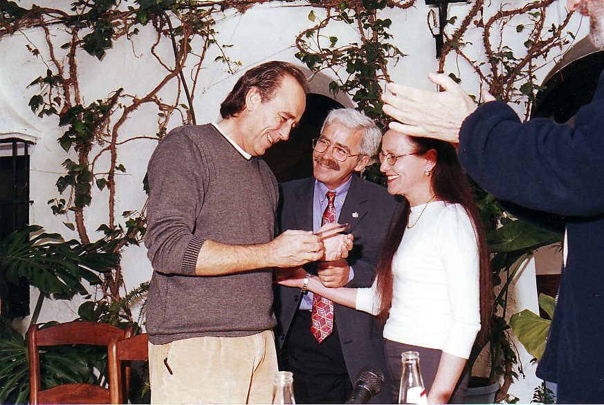 El cantante español Joan Manuel Serrat recibe la Fiambrera de Plata 2001 del Ateneo de Córdoba.